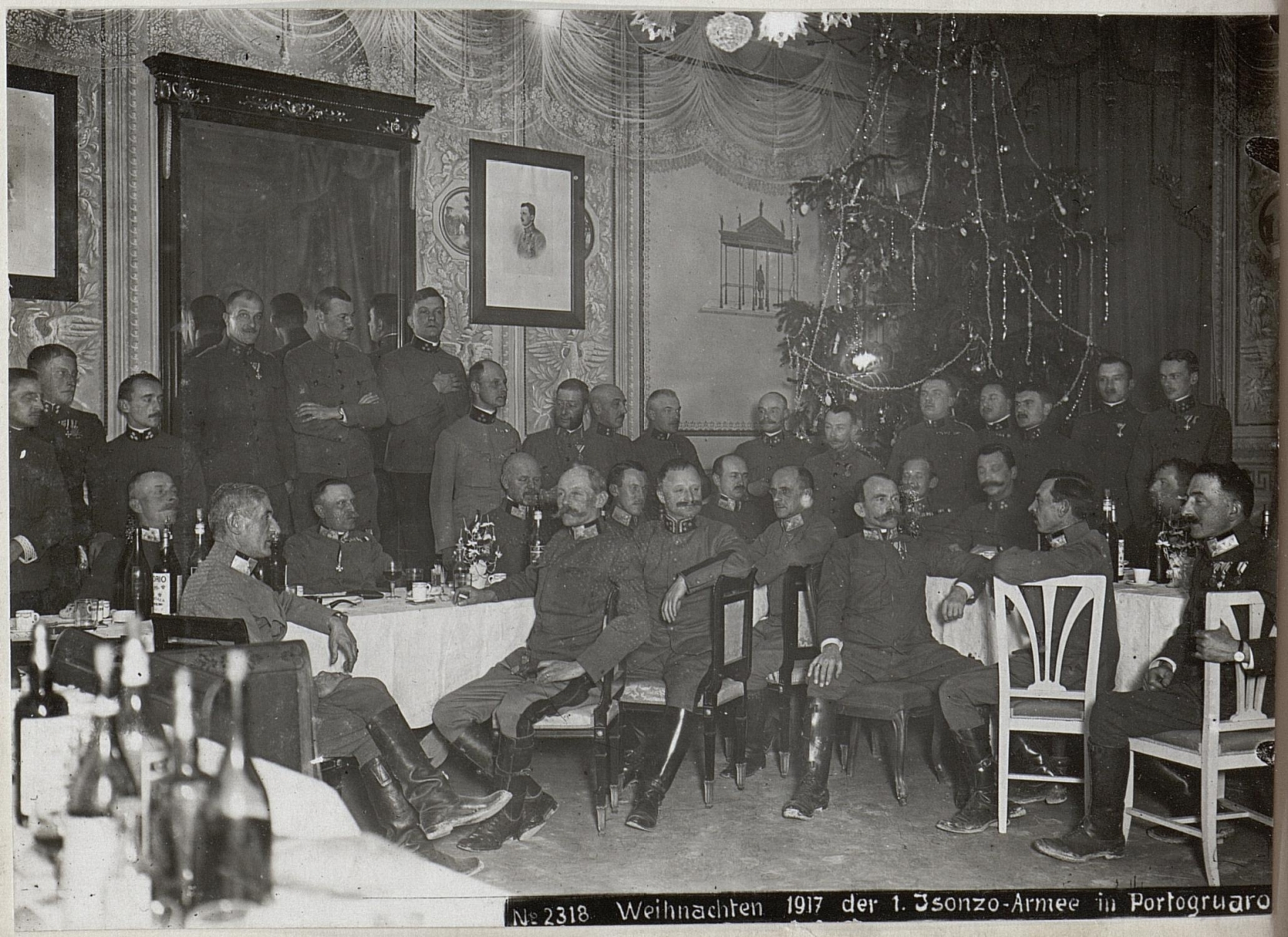 Weihnachten 1917 der 1.Isonzo-Armee in Portogruaro###